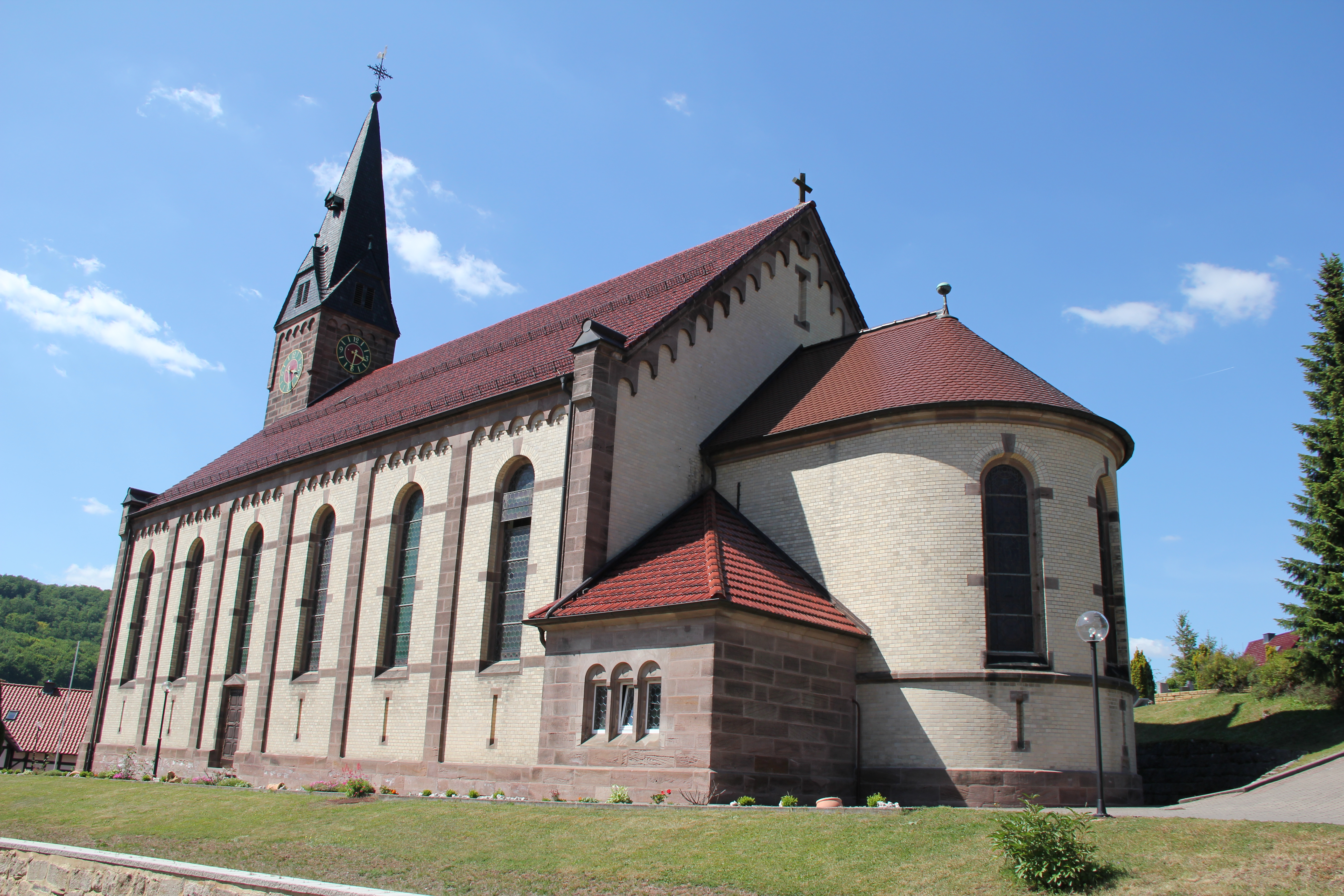 Kirche St. Mauritius in Lutter (Eichsfeld)